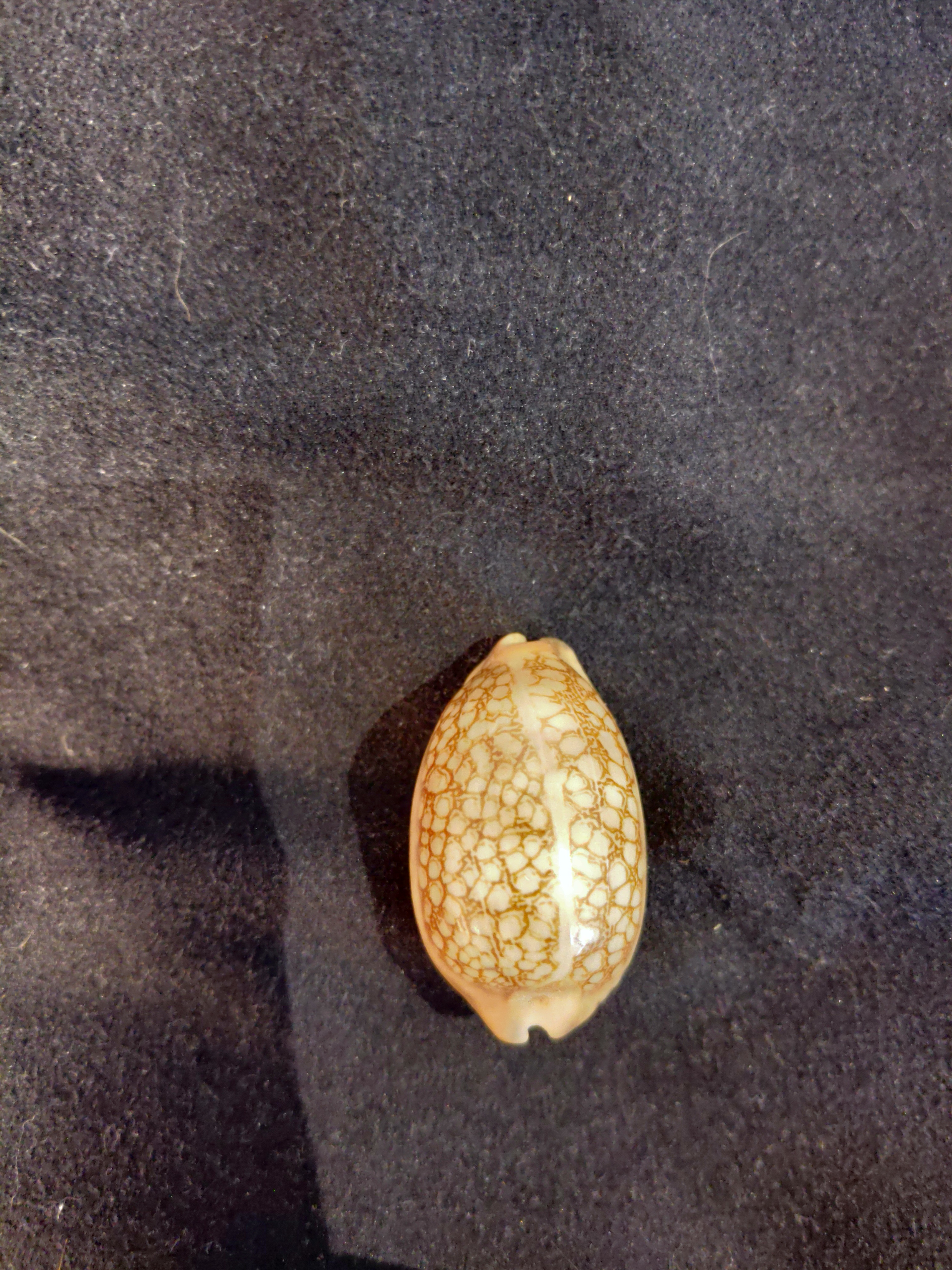 Exemplar av Maurutia Scurra från Kenya.